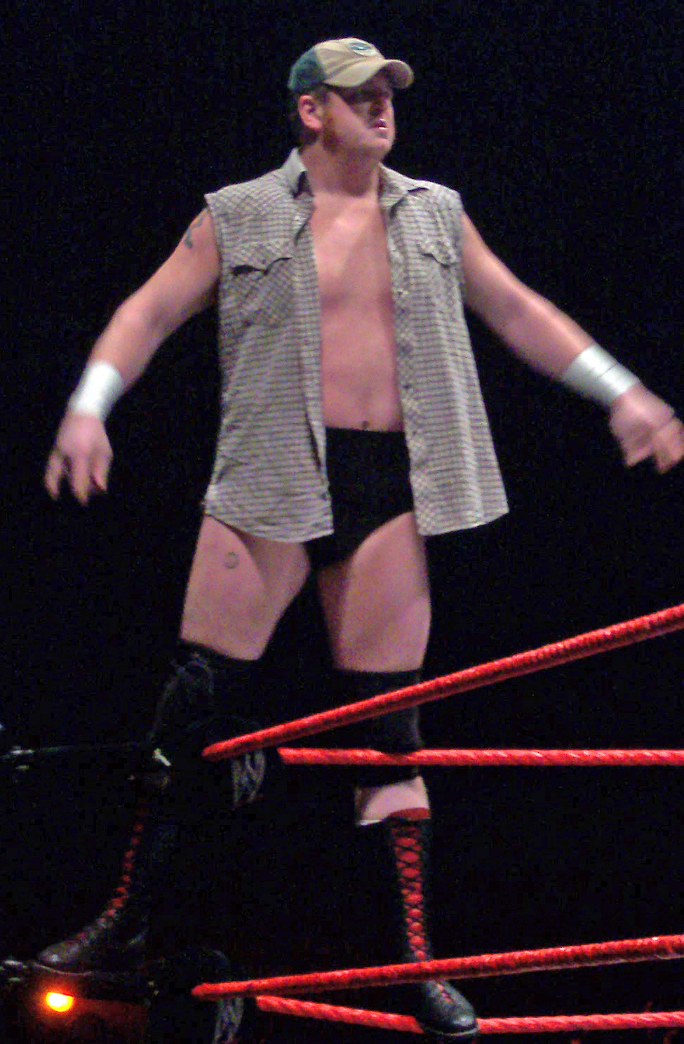 Trevor Murdoch 2007 in Bremen